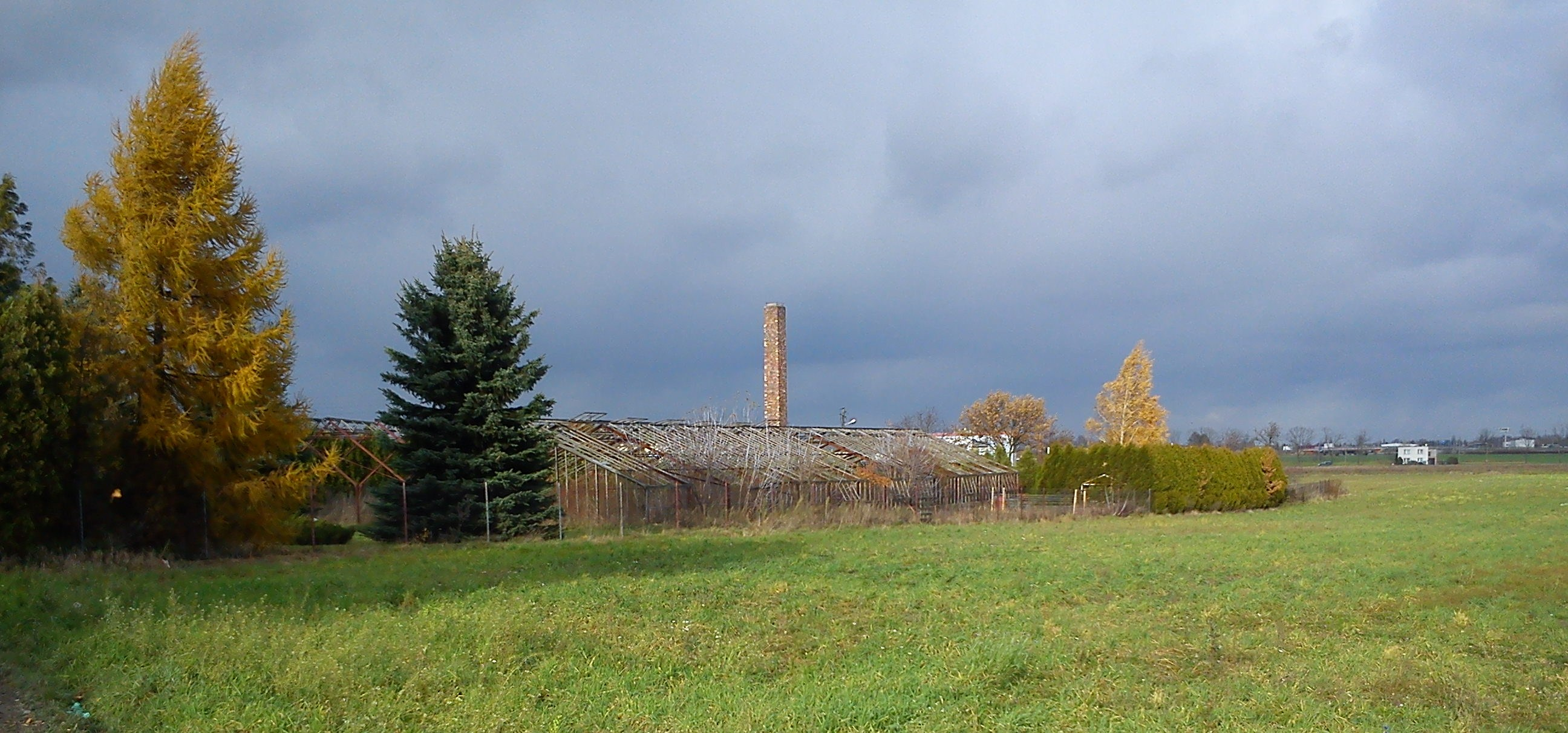 Poznań, krajobraz Krzesin.